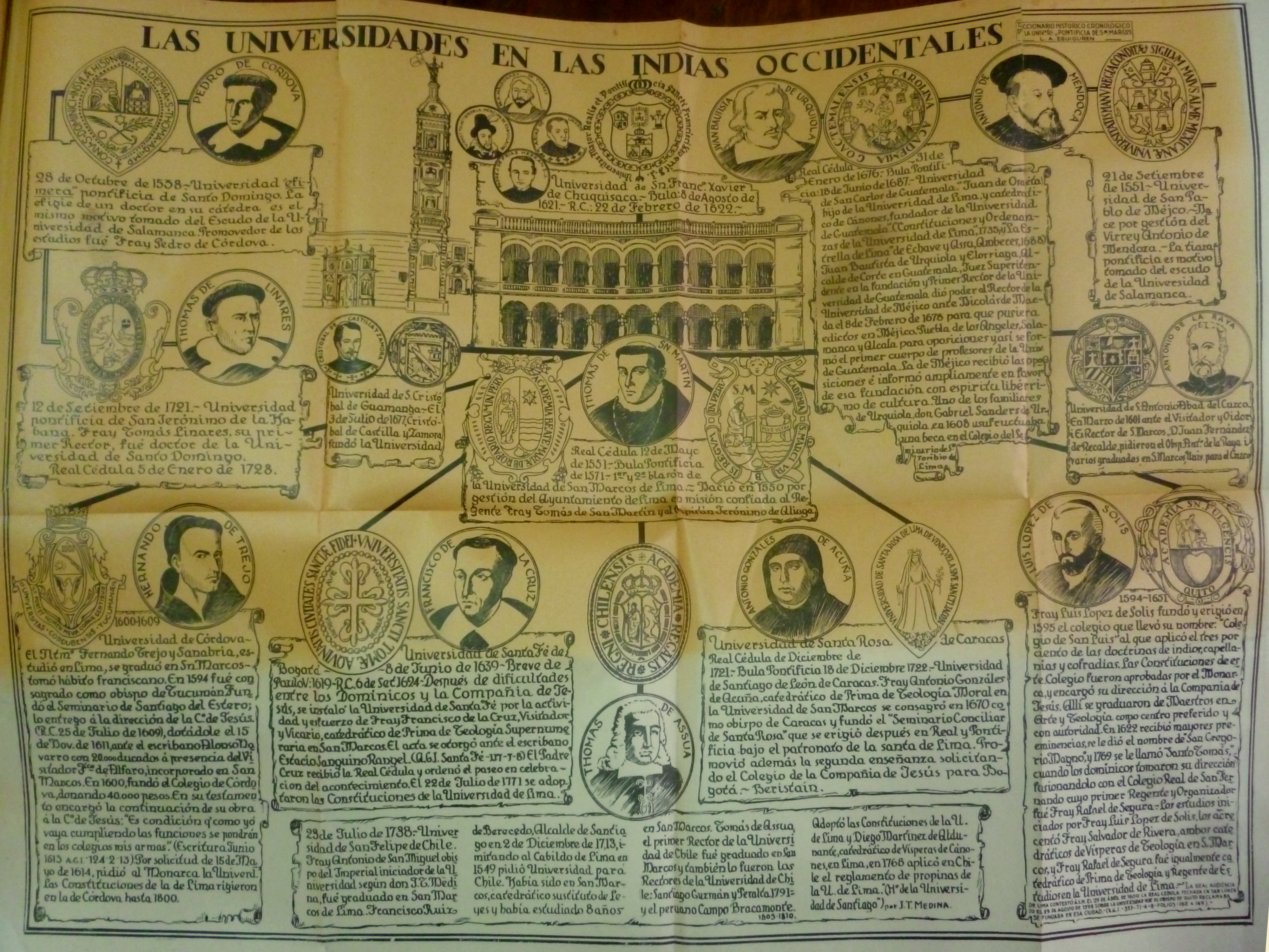 Las Universidades en las Indias Occidentales. Tomado de: Diccionario Histórico-Cronológico de la Real y Pontifica Universidad de San Marcos y sus Colegios: Tomo I (1940).